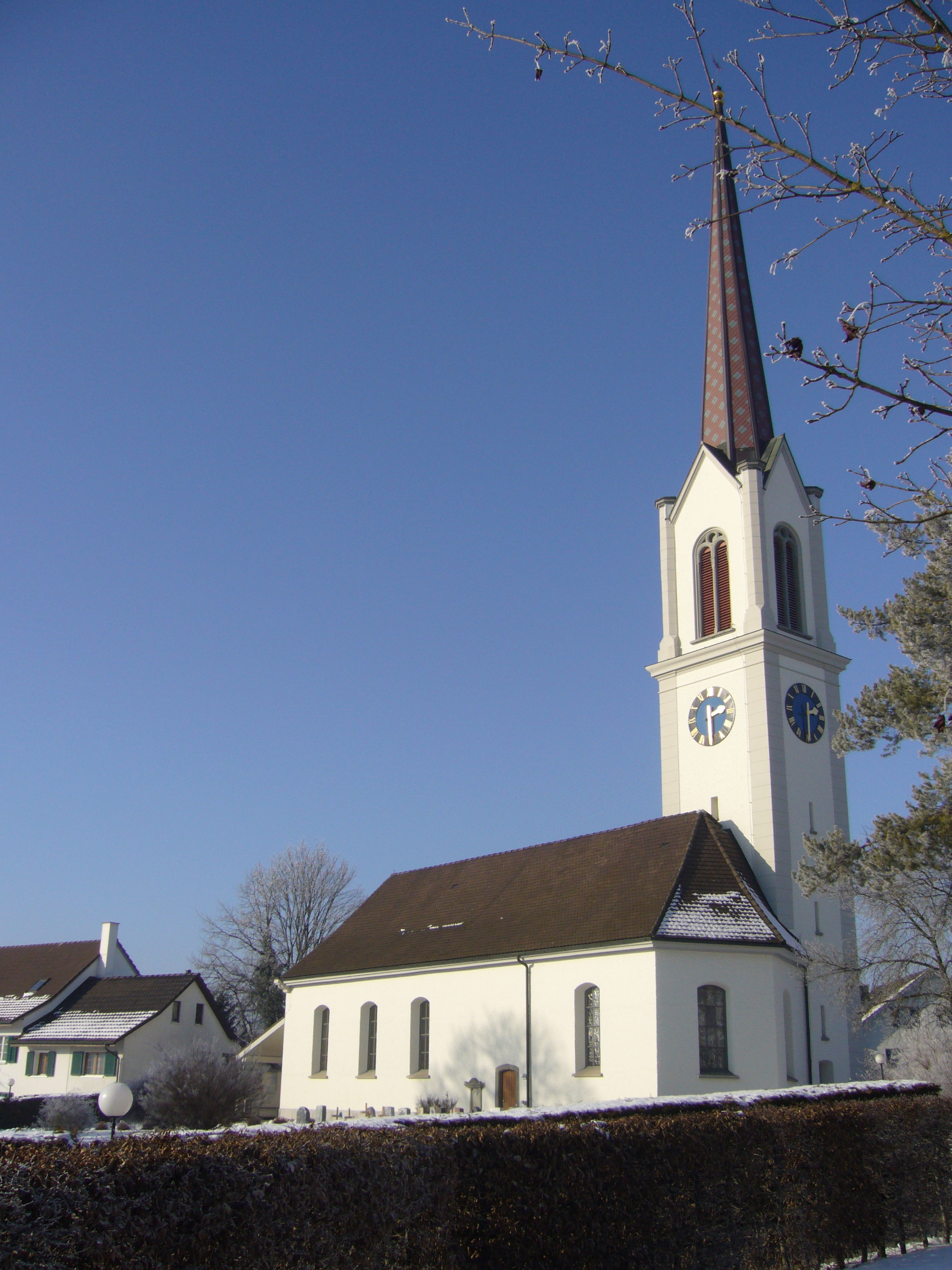 Reformirte Kirche zu Matzingen.